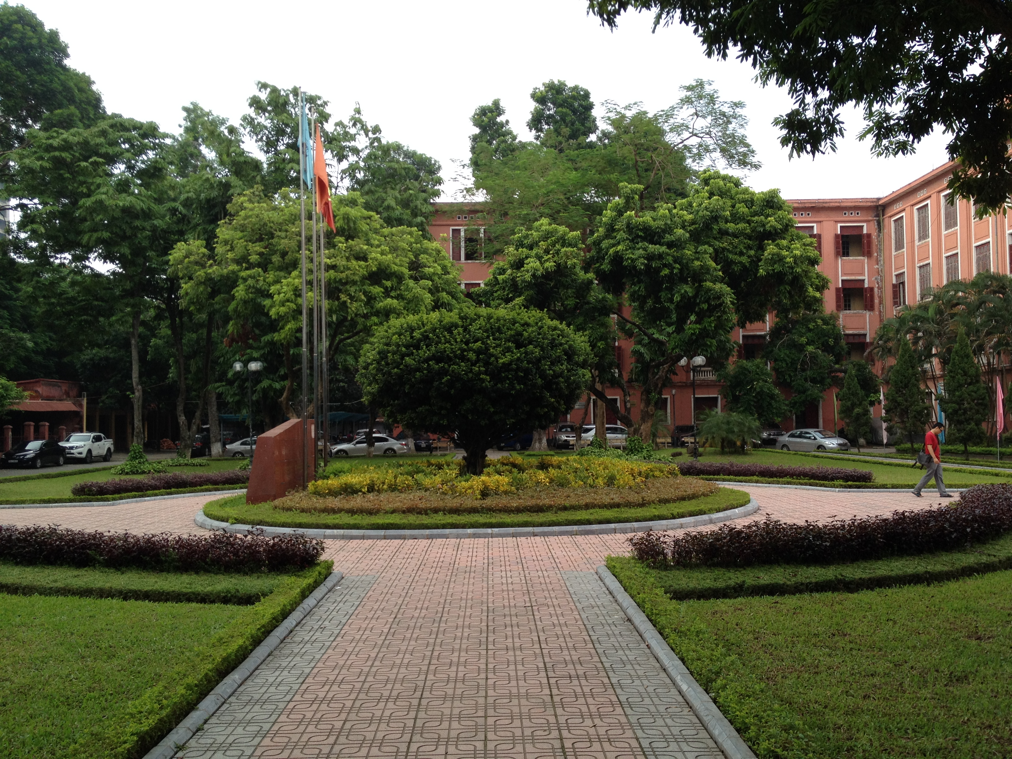 Đại học Thuỷ Lợi, Hà Nội, Việt Nam.